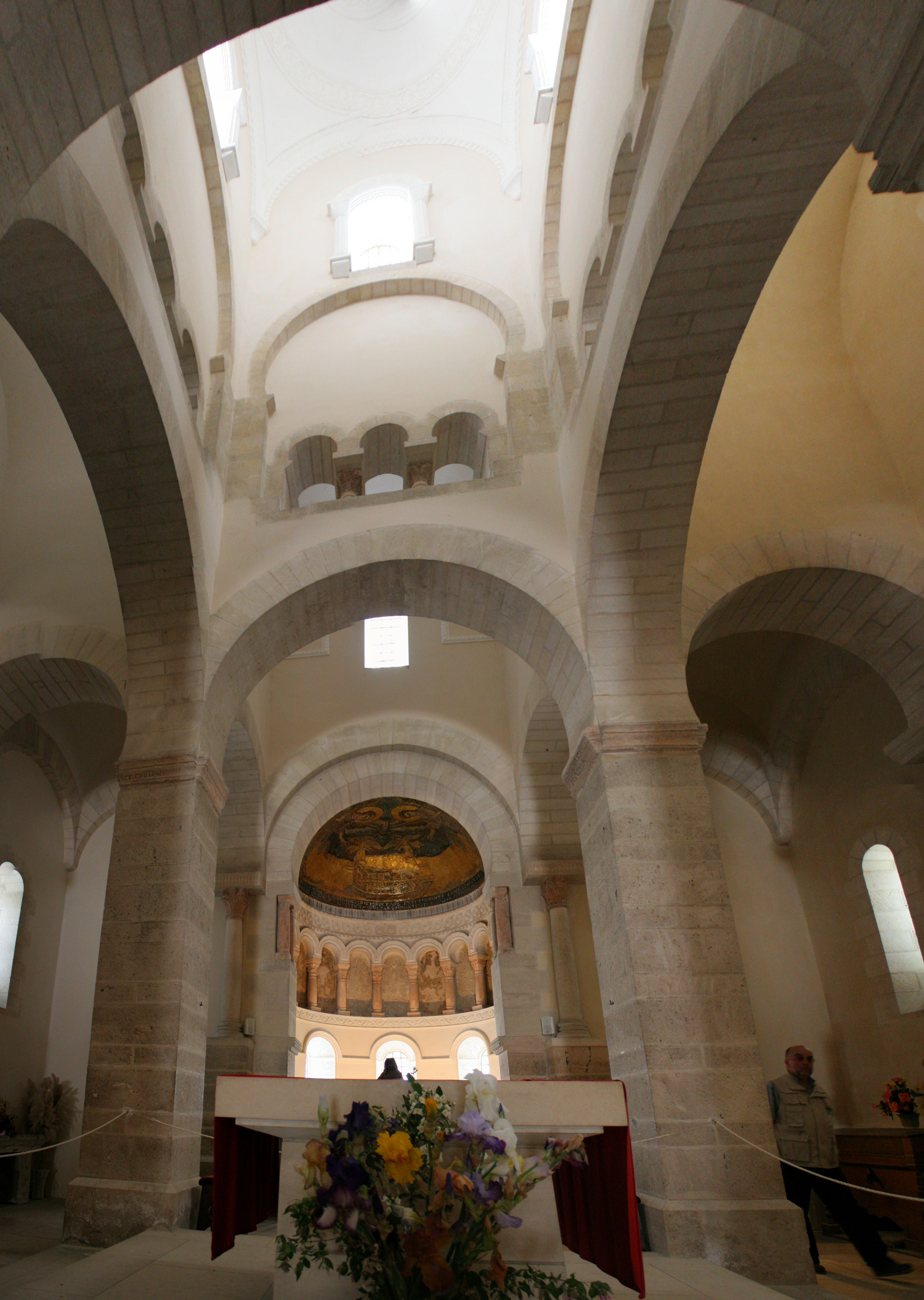 Oratoire caroligien de Germigny-des-Prés (Loiret) - vue de la coupole et du carré de transept